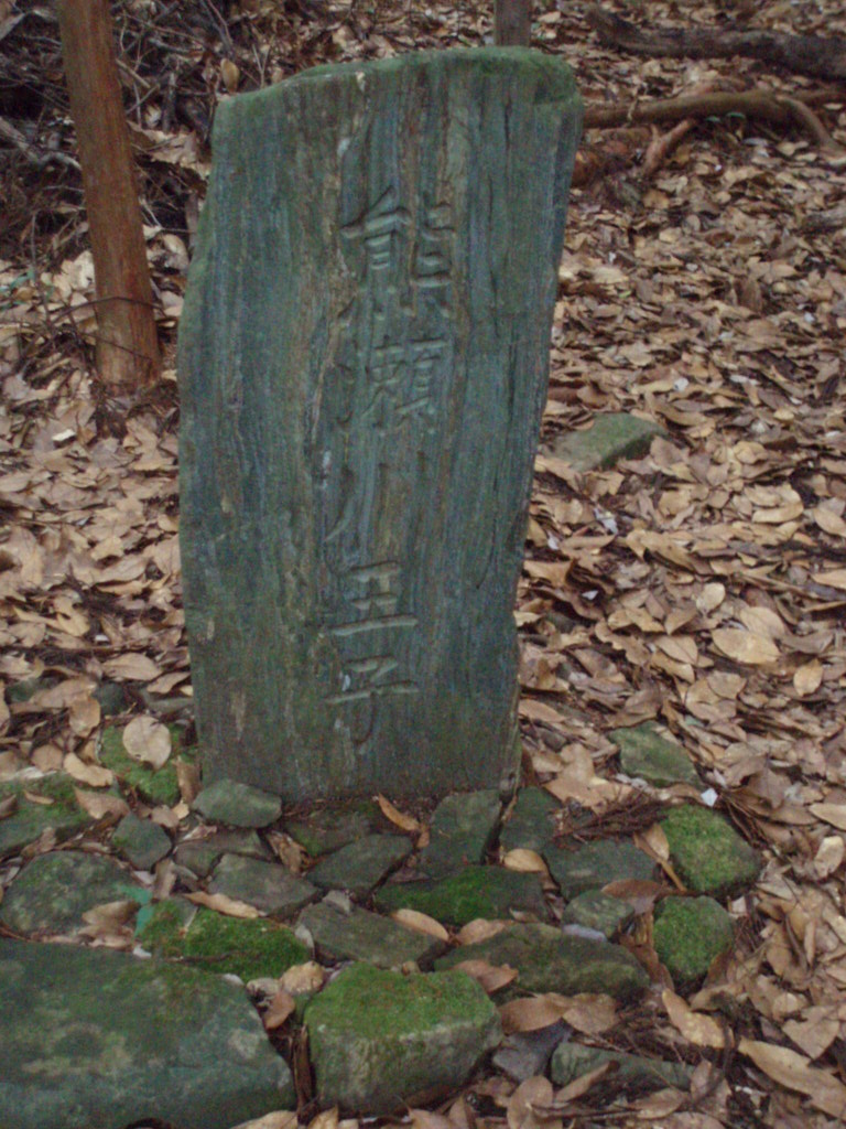 Monument_KUMASEGAEA-oji_remains